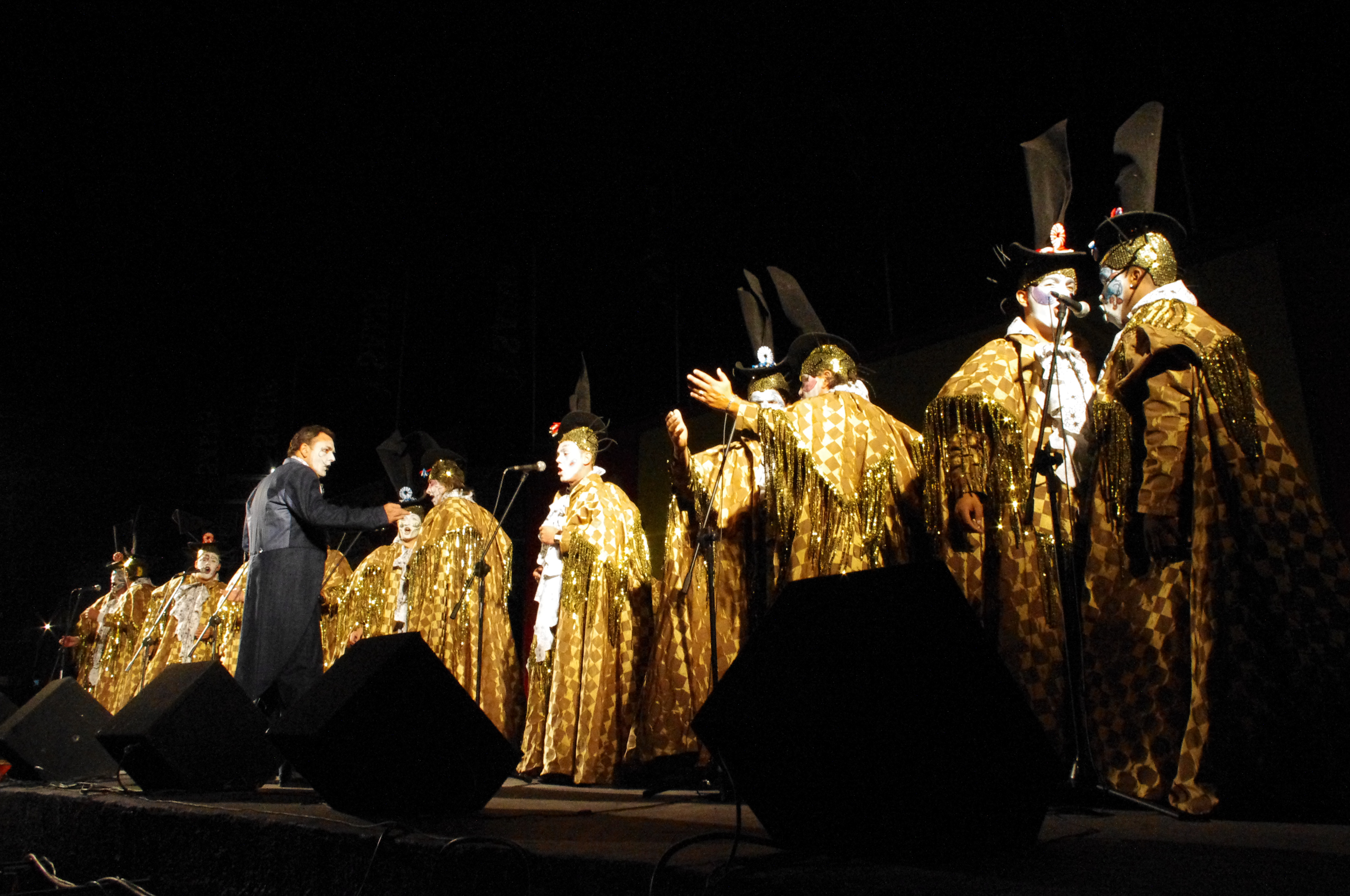 Fotografía de la actuación de la murga de Uruguay "La Margarita" en el Defensor Sporting en el marco del carnaval oficial 2011.